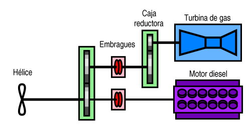 Esquema de un sistema CODOG Same as Image:CODOG-diagram.png with Spanish legend. Modified version of a public domain drawing made by Alureiter. Modifications also released into public domain. Idéntica a Image:CODOG-diagram.png con leyendas en español. Versión modificada de un dibujo hecho por Alureiter y puesto por él en el dominio público. Las modificaciones son también colocadas en el dominio público.